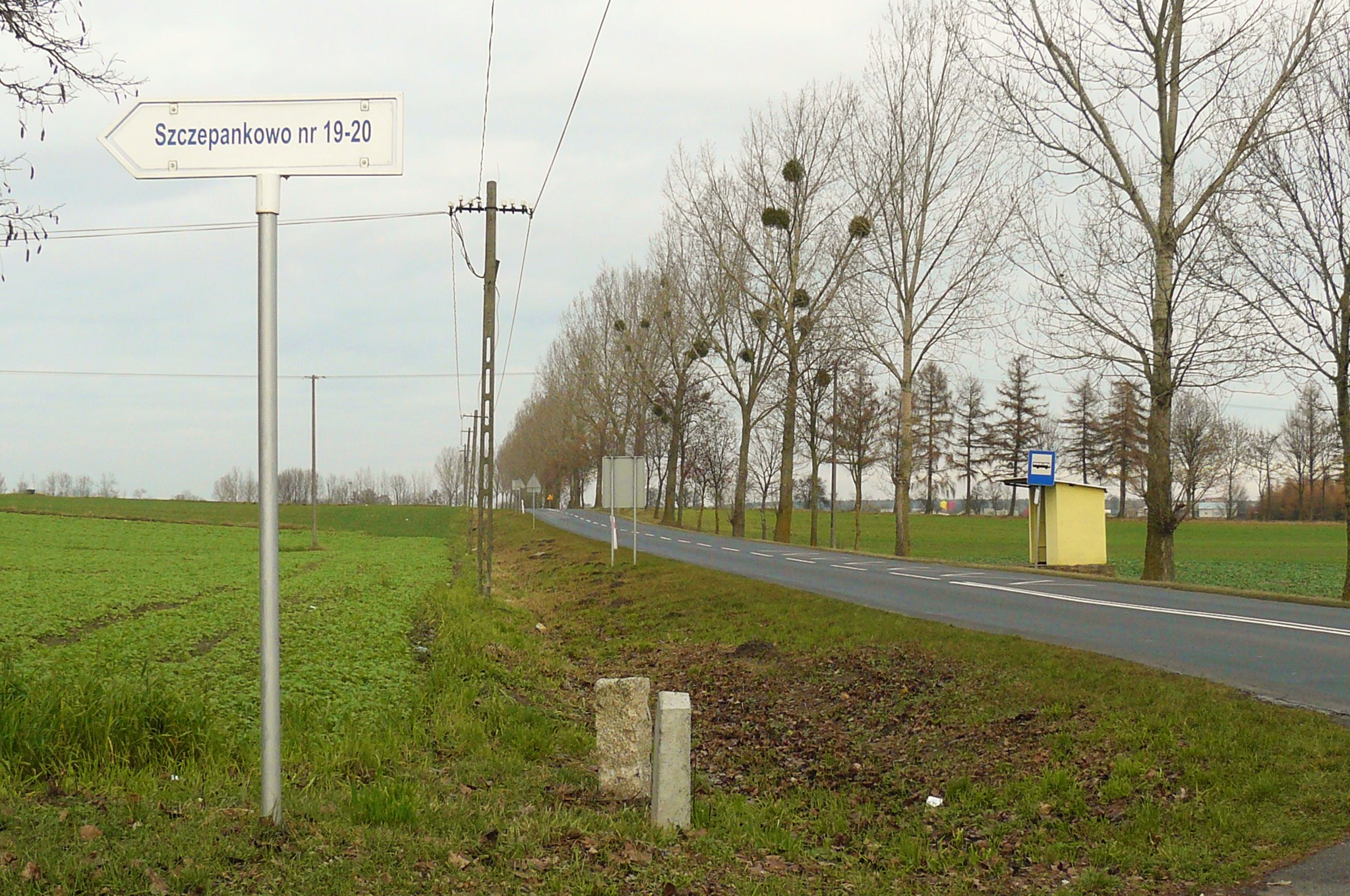 Szczepanowo, gm. Dąbrowa, pow. mogileński, woj. kujawsko-pomorskie, Polska.